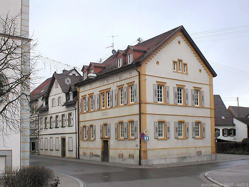 Geburtshaus und später nochmals zeitweilige Wirkungsstätte von Adolf Schmitthenner in Neckarbischofsheim